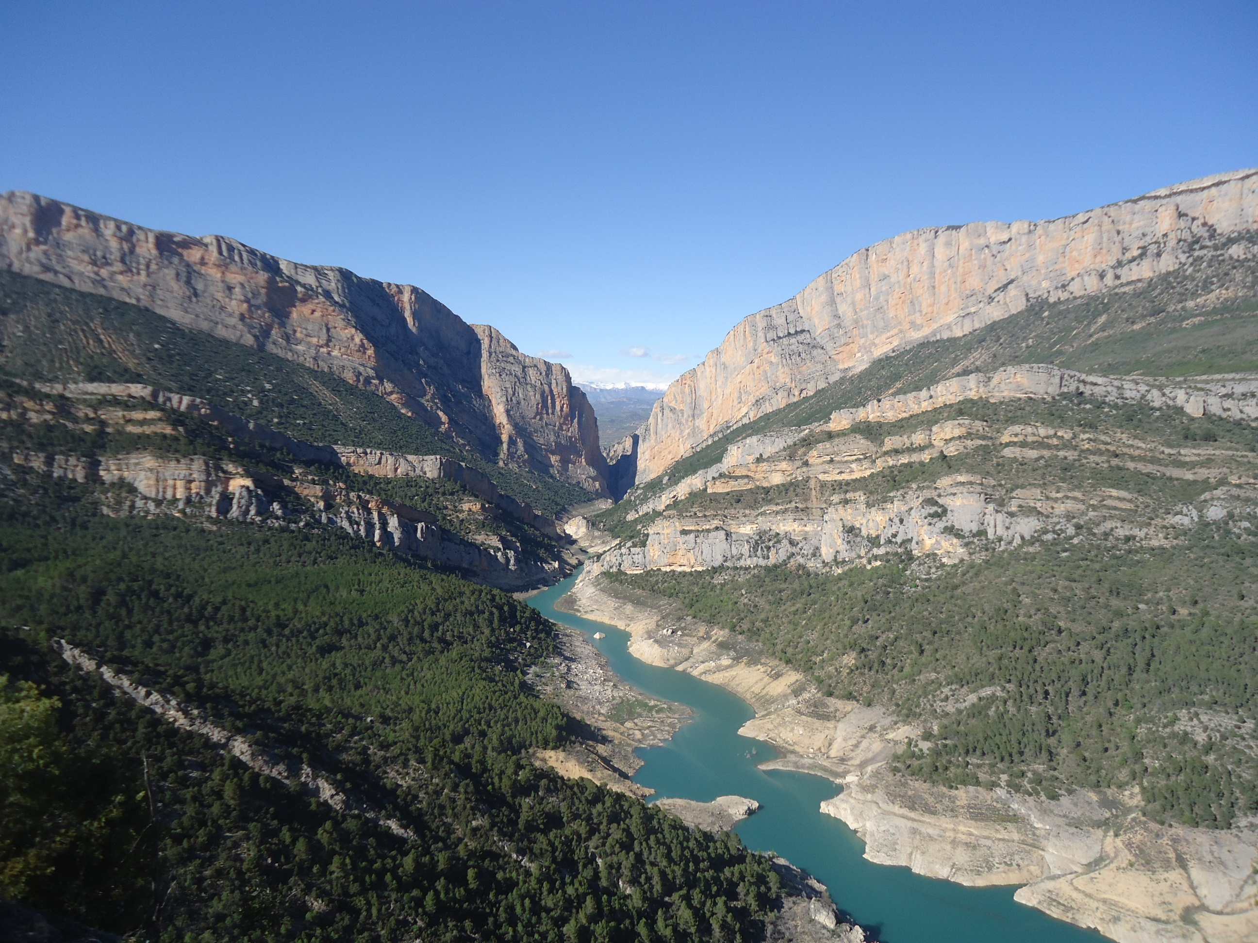 La sierra del Montsec forma parte del conjunto de Sierras Exteriores del Pirineo Central. Discurre de este a oeste a lo largo de unos 40 km de longitud, cortada por los ríos Noguera Ribagorzana y Noguera Pallaresa. El Noguera Ribagorzana, frontera natural entre Aragón y Cataluña, al atravesar la sierra del Montsec separa Montsec de L’Estall (o sierra de Montgai), en la provincia de Huesca, del Montsec d’Ares, en Lleida.